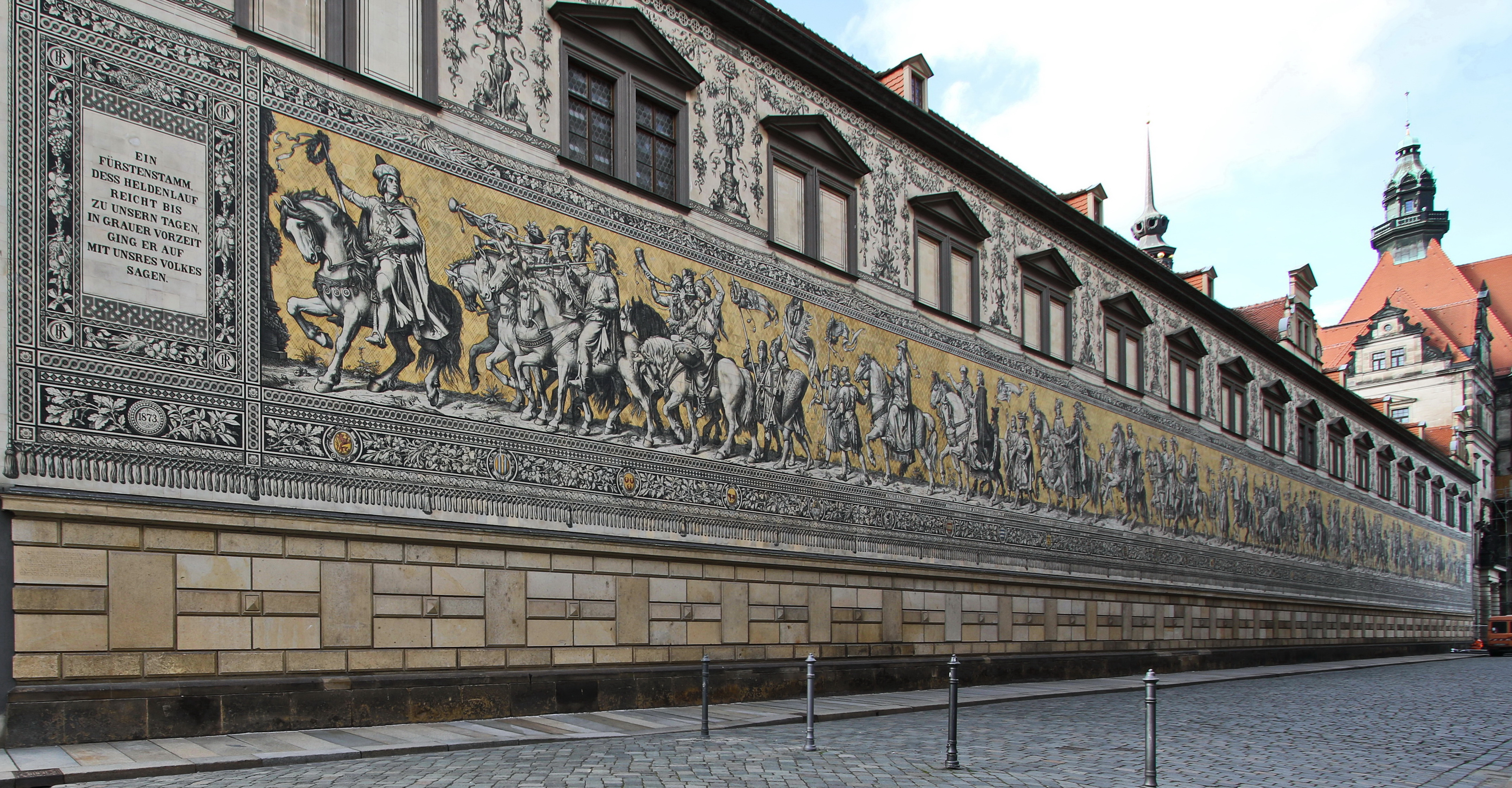 Der Fürstenzug in der Augustusstraße in Dresden, Blick in westlicher (schlosswärtiger) Richtung.